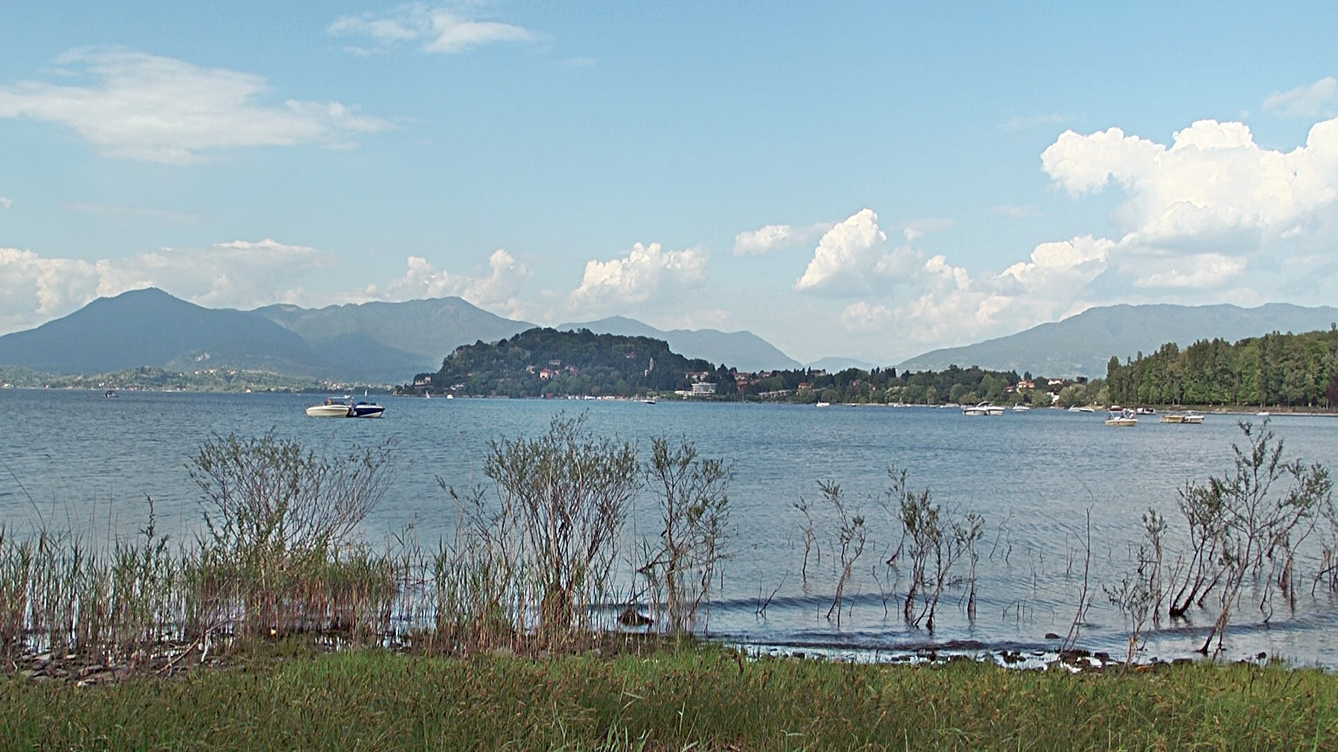 Ripresa effettuata dal confine di Ispra con Ranco, in riva al lago Maggiore, in data 1 maggio 2011.